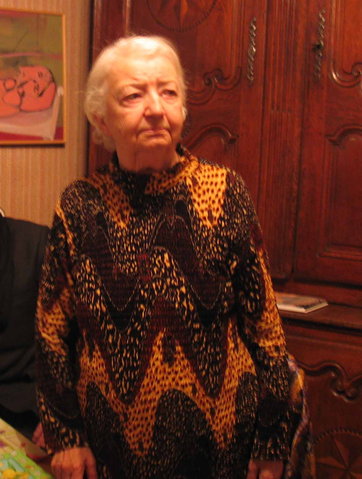 Le peintre Solange Bertrand, dans son appartement de la rue de Reims, à Montigny-les-Metz, début des années 2000.